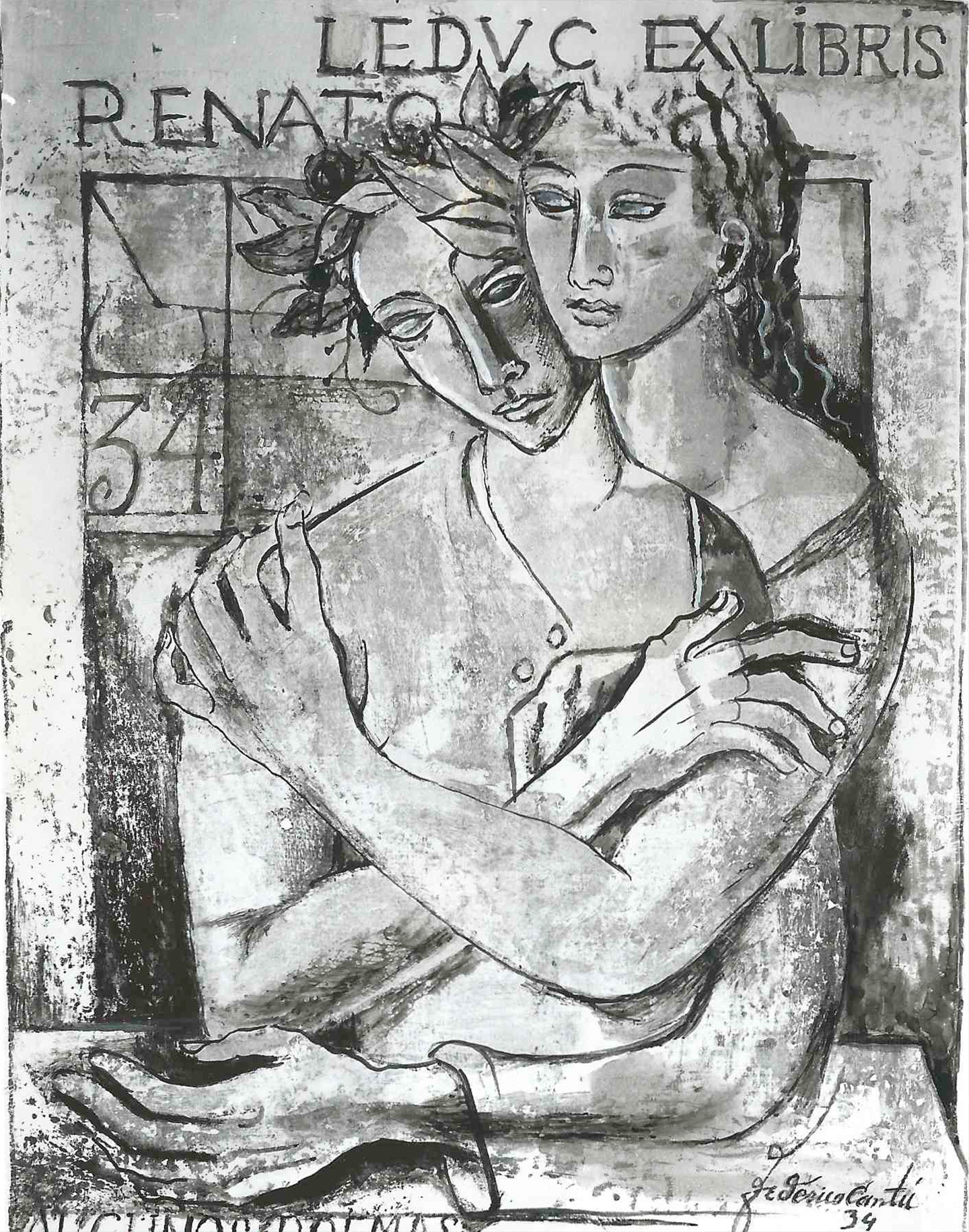 Renato Leduc ( Poemas en Paris )- Federico Cantú- Colección Cantú Y de Teresa